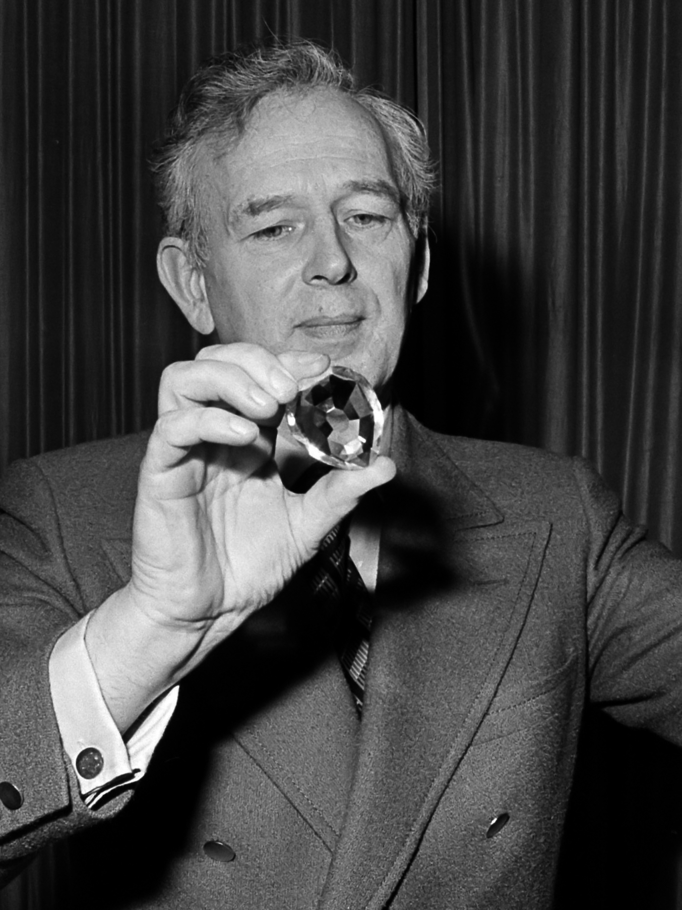 Presentatie Nederlandse uitgave Groot Guiness Record Book schrijver Norris Mc Whriter met model grootste diamant ter wereld 22 februari 1977